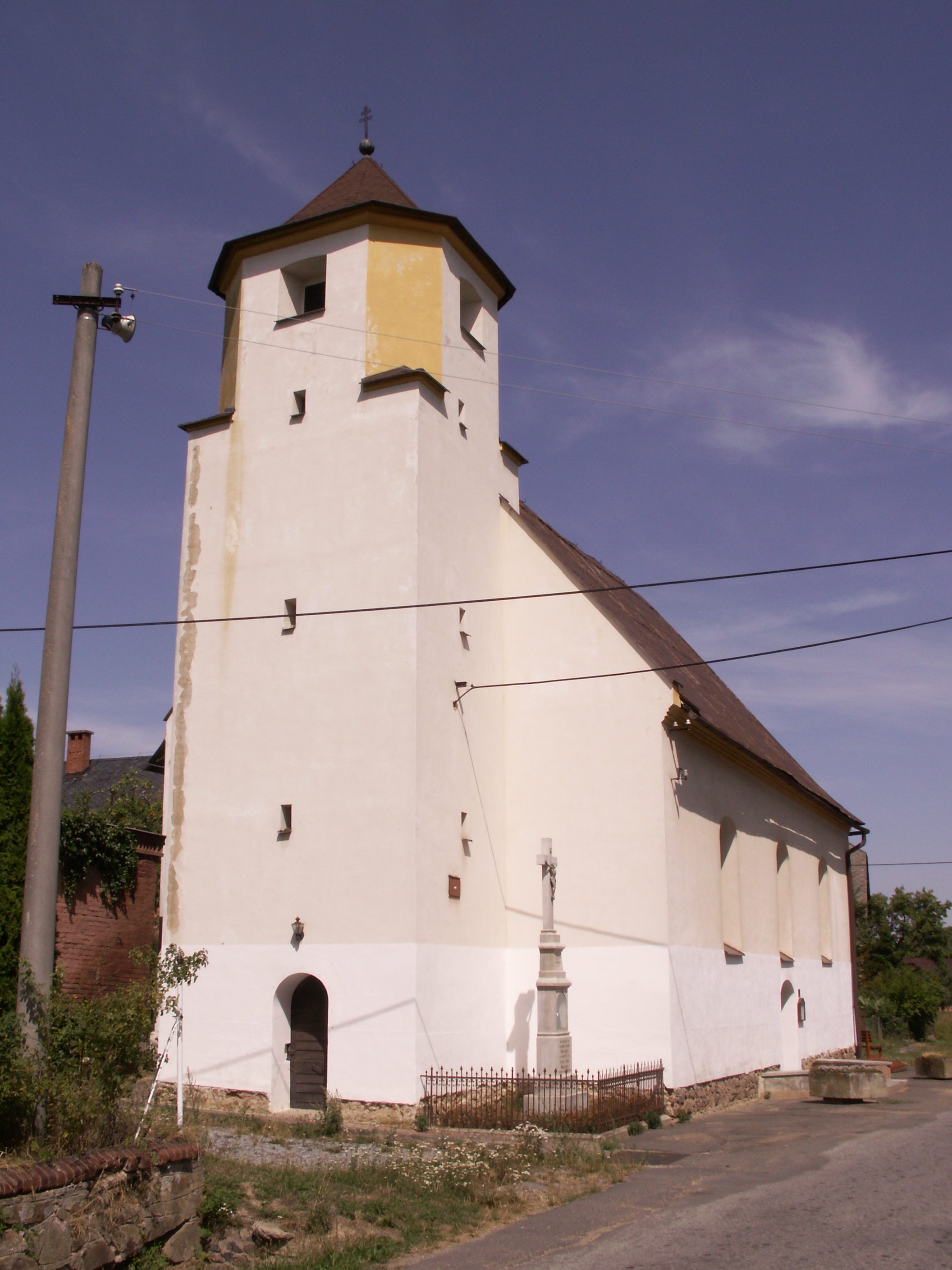 Hlinka, okres Bruntál, kraj Moravskoslezský, kostel svatého Valentina